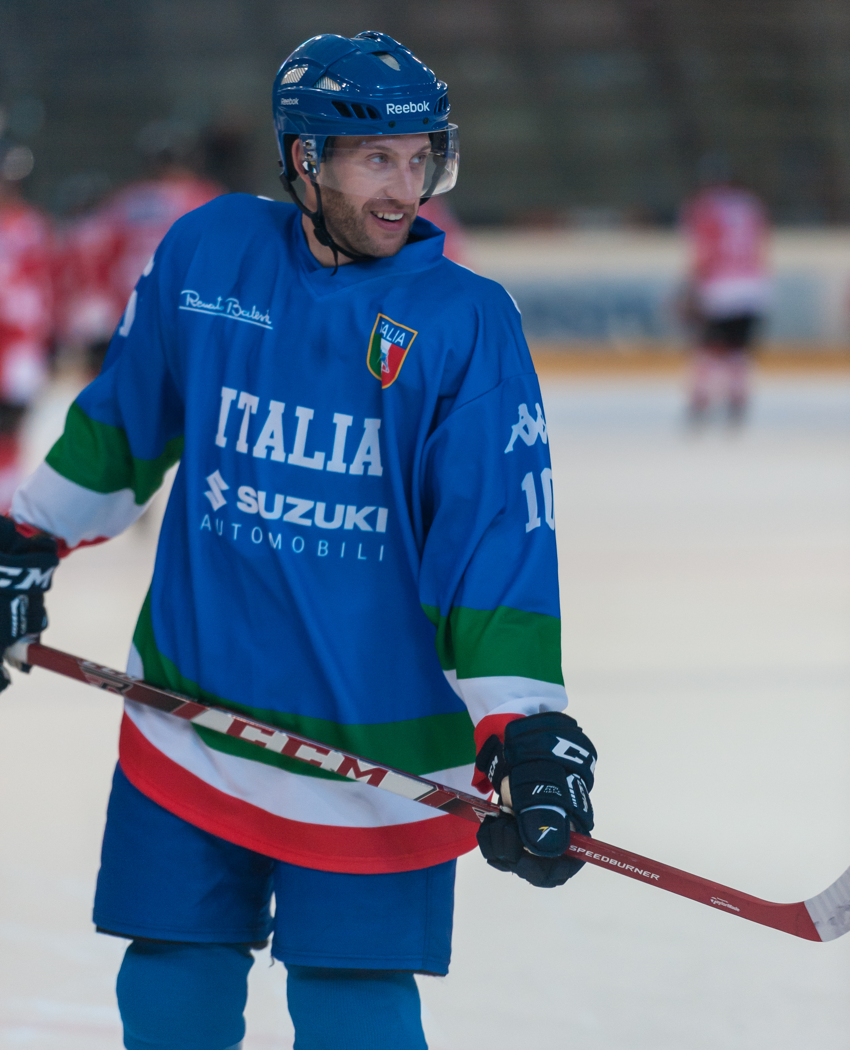 Freundschaftliches Eishockey-Länderspiel - Österreich vs Italien. Bild zeigt Giulio Scandella (ITA).